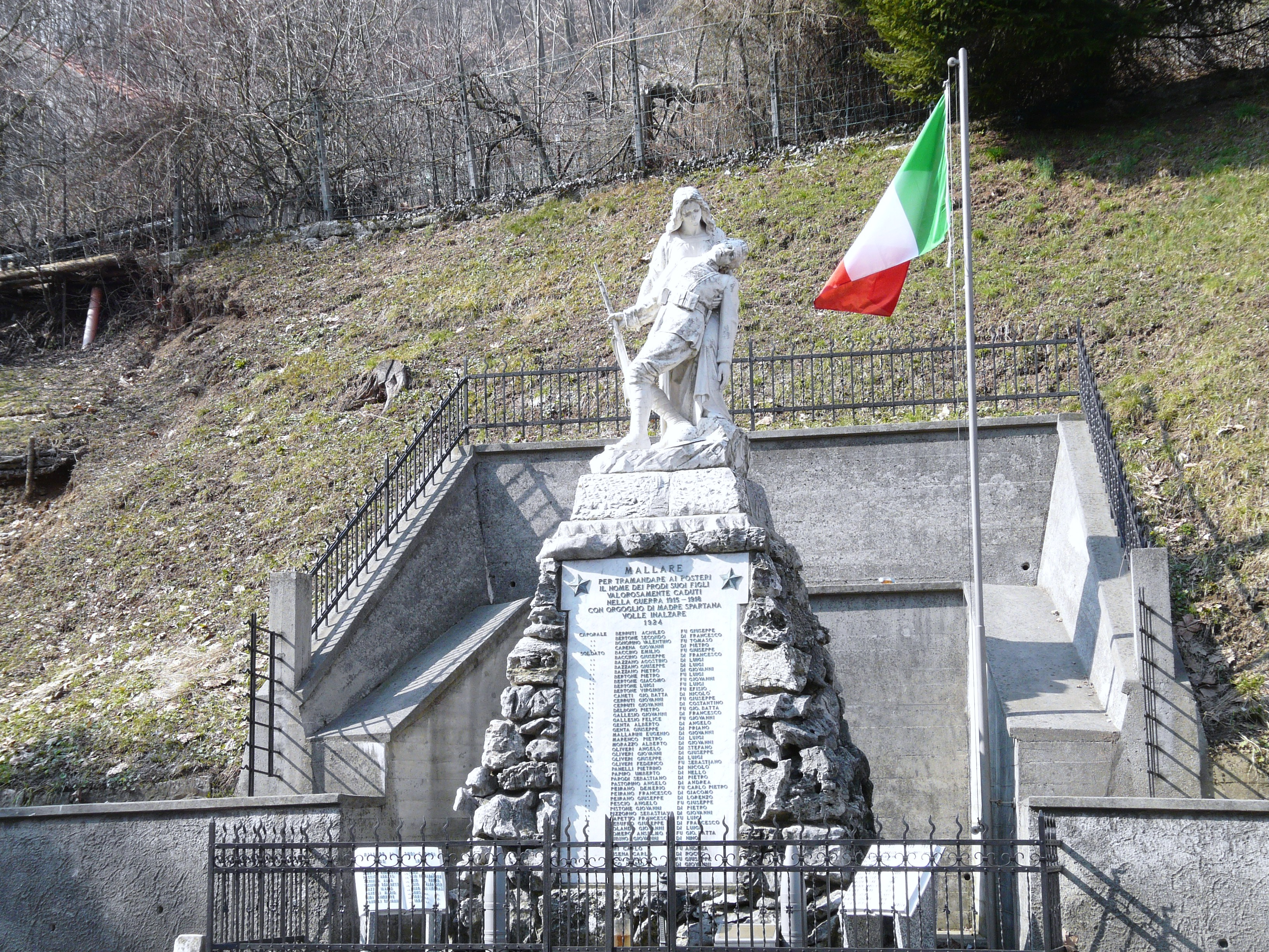 Monumenti ai caduti, Mallare, Liguria, Italia